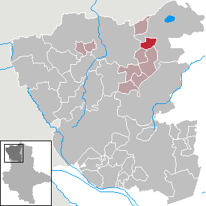 (Original text: Vissum im Altmarkkreis Salzwedel)